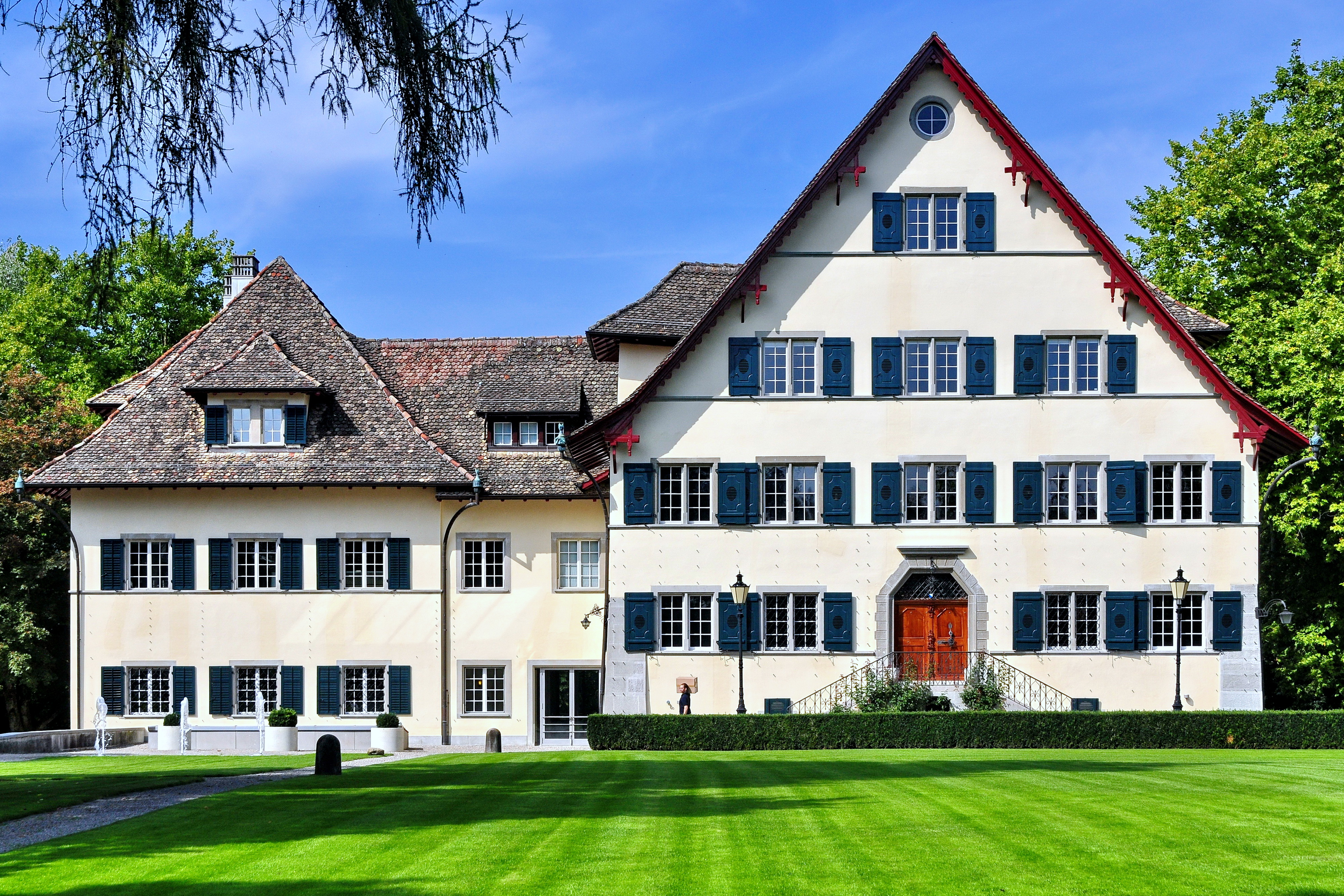 Landgut Bocken, Hauptgebäude, Bockenweg in Horgen (Switzerland)